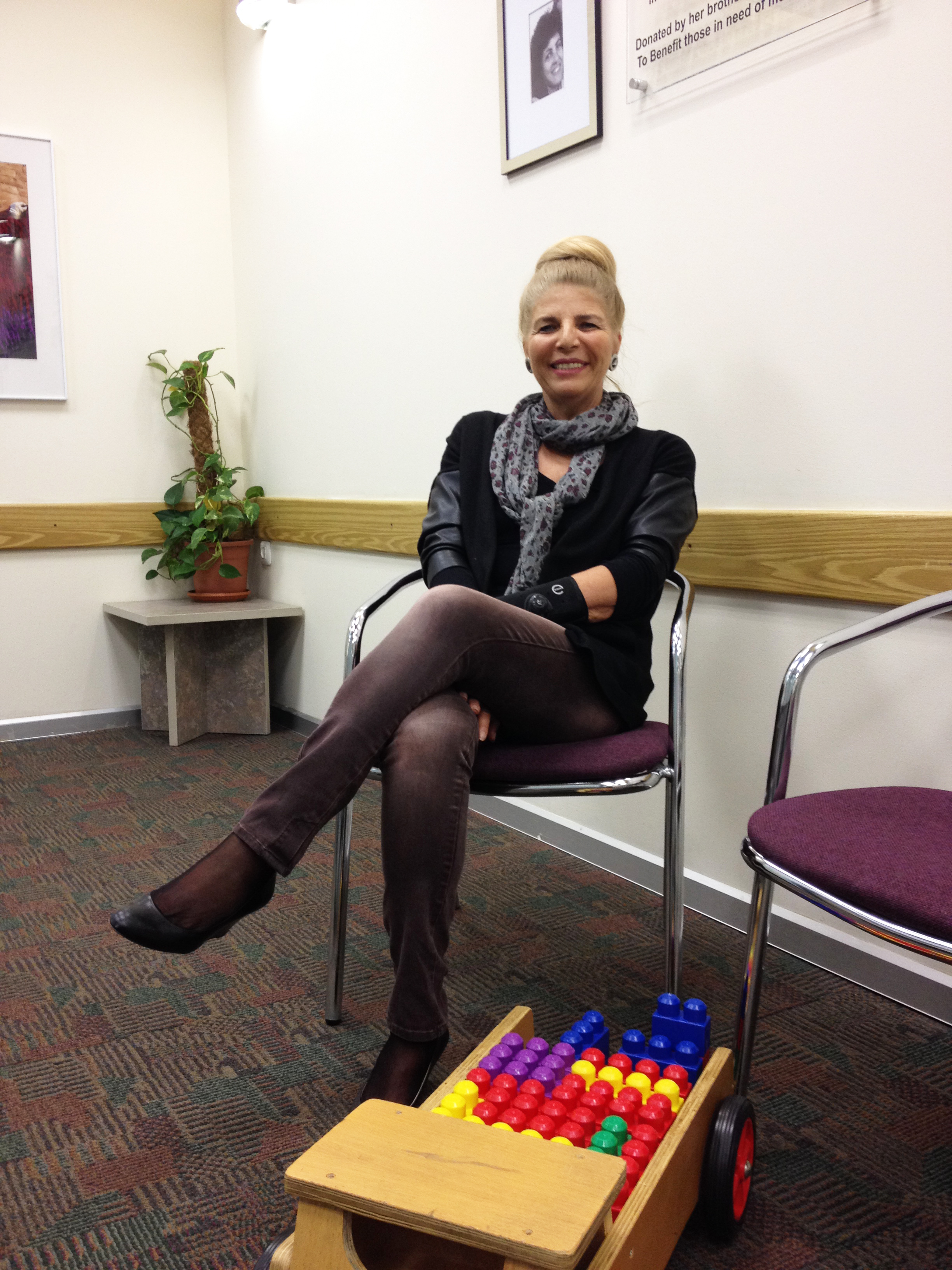 Rivka Yahav